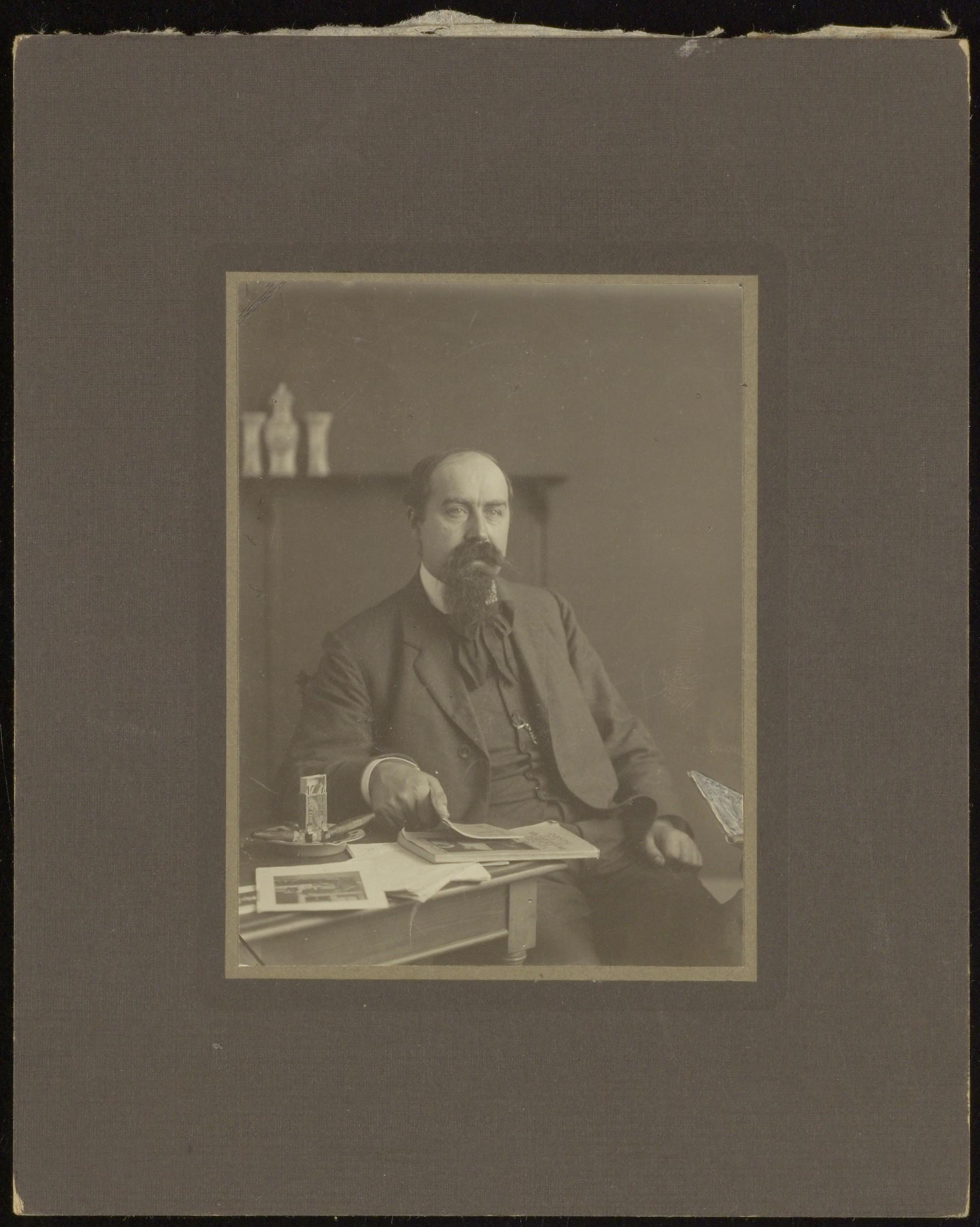 Beschrijving Portretfoto van Zeger Daniël Johan Wilhelm Gulden Documenttype foto Vervaardiger Leenheer, Cornelis G. (1869-1942) Collectie Archief van de Familie Gulden-Dutry Datering 1930 ca. Inventarissen Afbeeldingsbestand ANWN00383000002